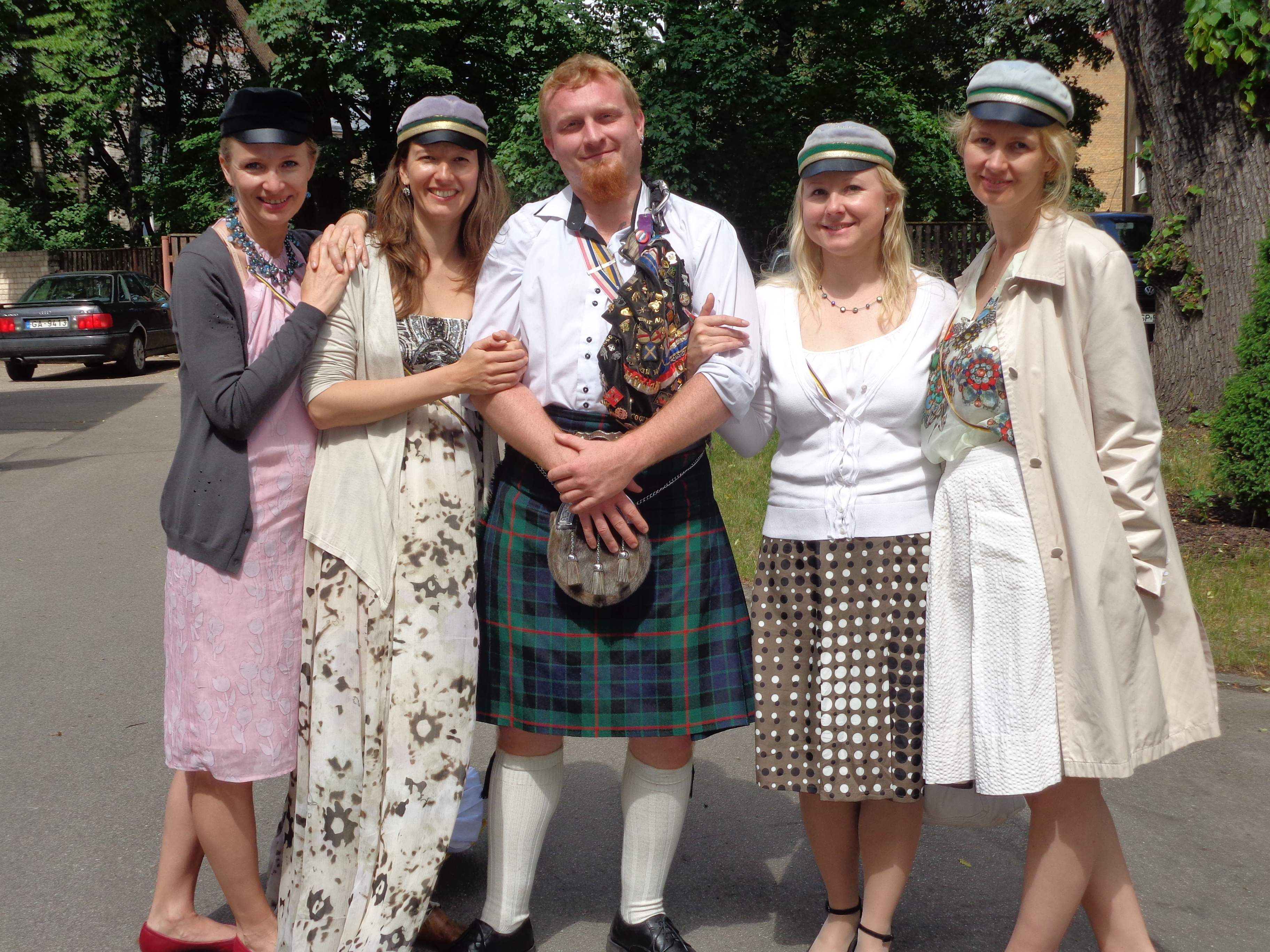 Vier Angehörige lettischer Damenverbindungen und ein Brite aus Strassburg in Riga im Garten der Latvia